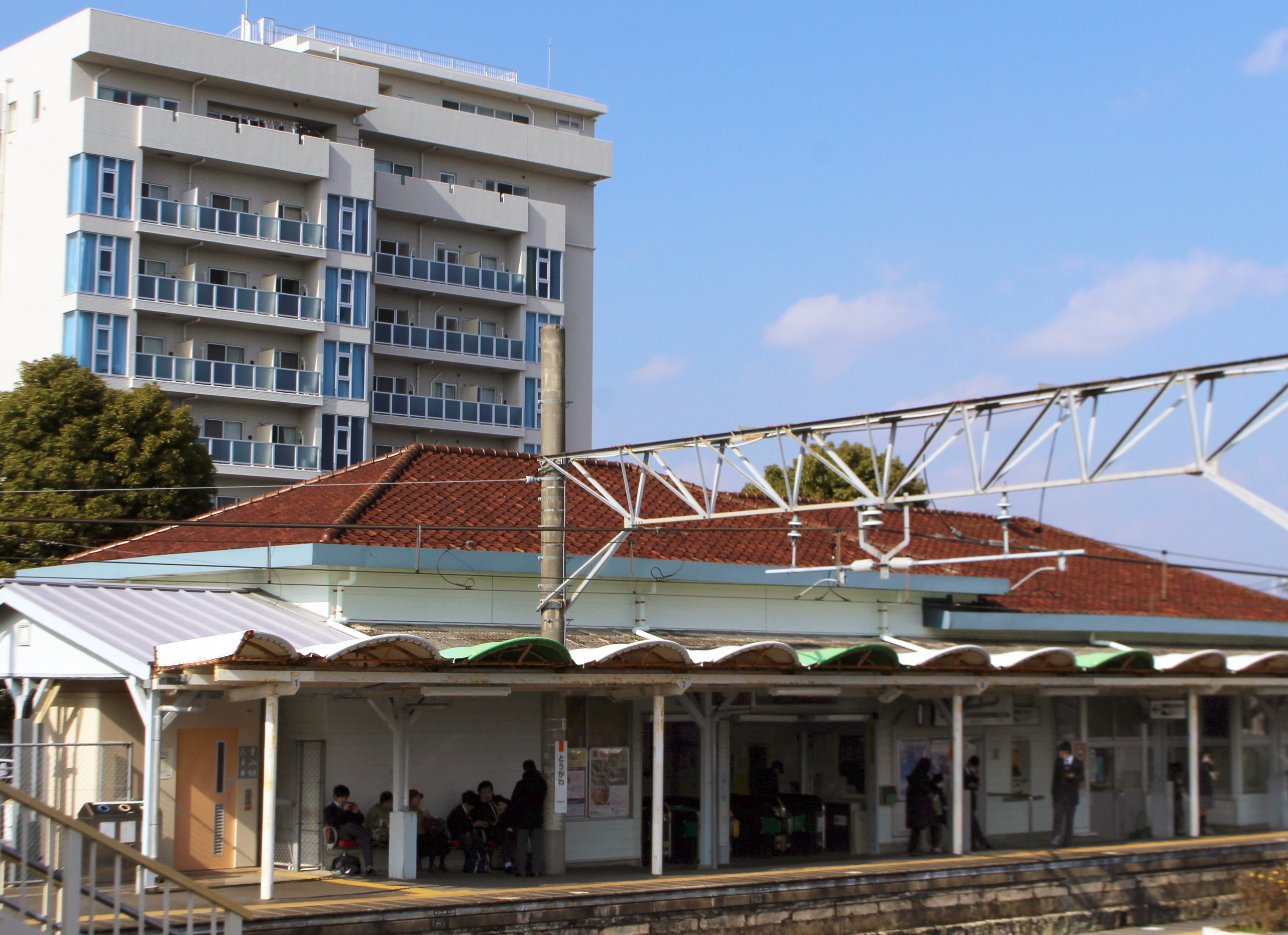 東金駅歩道橋から1番線ホームを望む（2019年3月5日撮影）